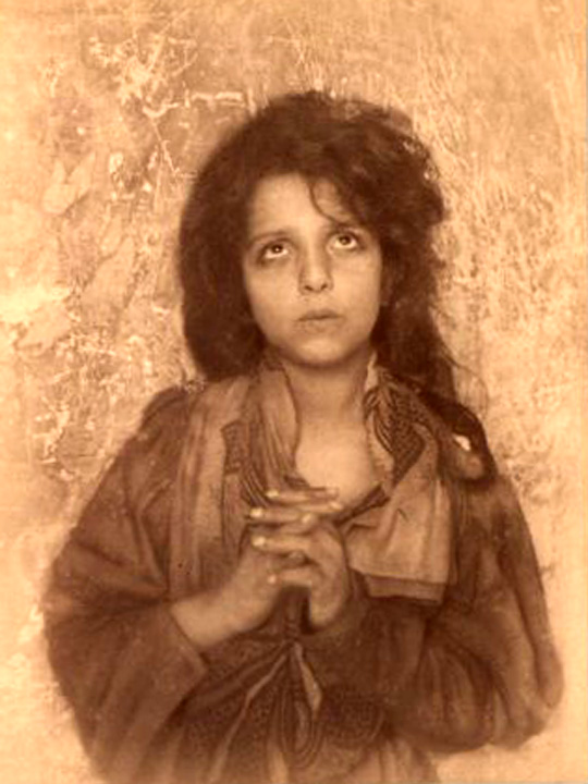 it - Wilhelm von Gloeden (1856-1931), Ragazzo travestito in abiti femminili in atteggiamento di preghiera. Numero di catalogo: n. 1336. Un altro esemplare di questa immagine è online sul sito del Musée d'Orsay. en - Wilhelm von Gloeden (1856-1931), Praying boy posing in female dress.Catalogue # 1336. This image is featured on the Website of the Musée d'Orsay.